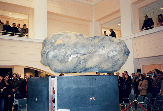 Deze foto heb ik genomen op 15 december 1999 tijdens de onthulling van het kunstwerk "Het Is Me Wat" (een magnetisch zwevende 'steen') van Wim T. Schippers in het Ministerie van VWS te Den Haag.